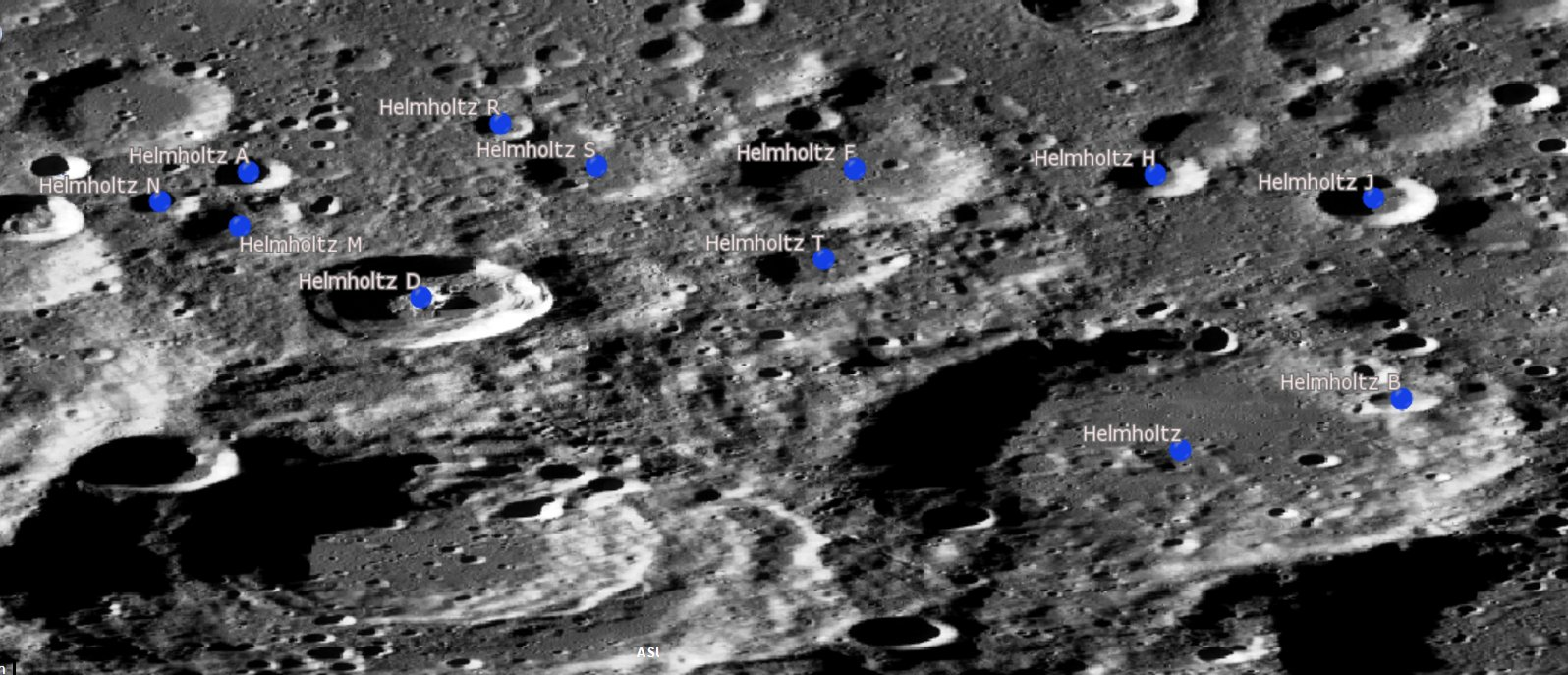 Cráter lunar Helmholtz. (Imagen LRO)